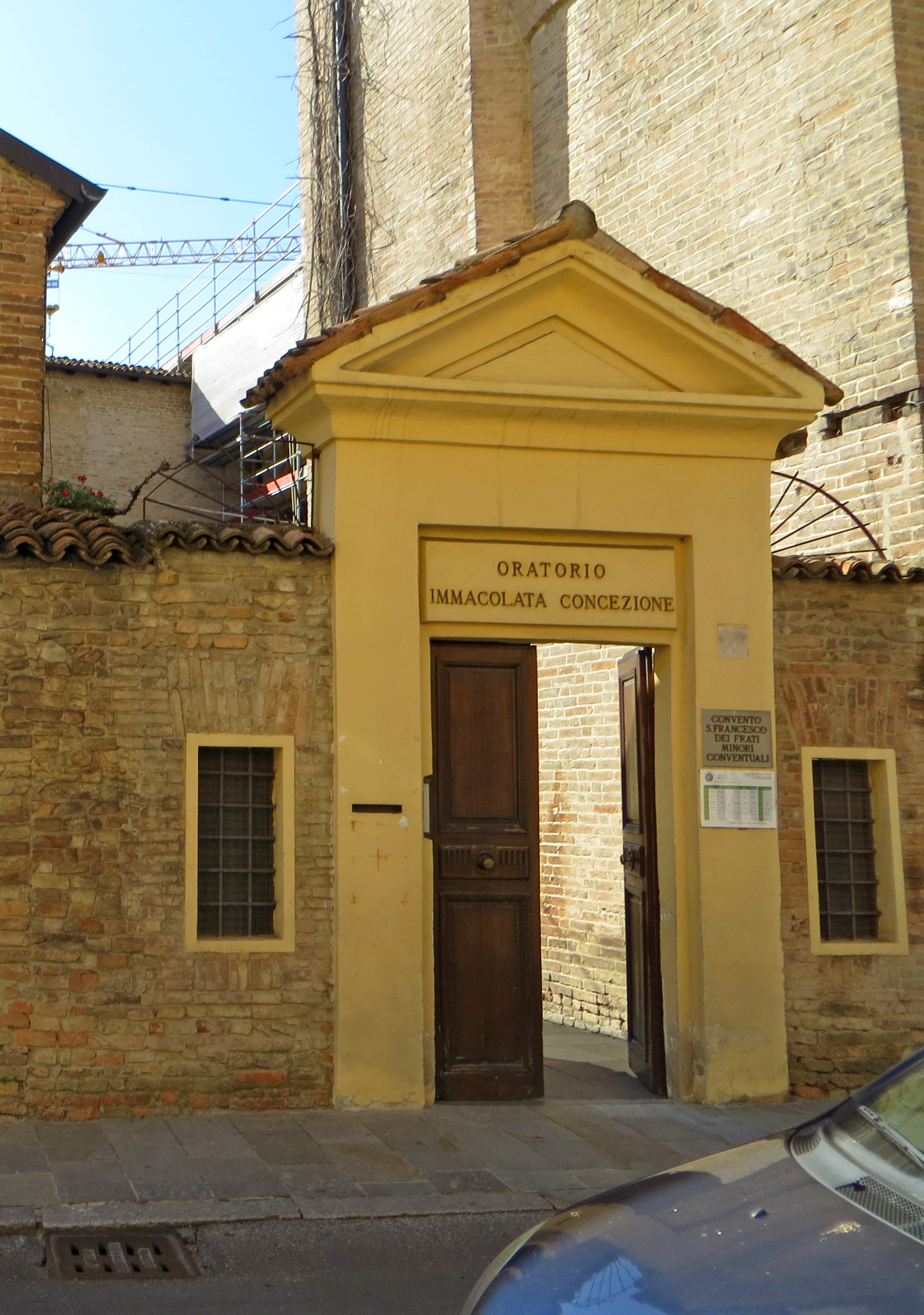 Oratorio dell'Immacolata Concezione (Parma) - ingresso